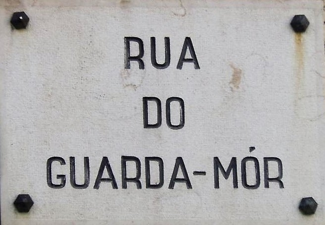 Rua do Guarda-Mor, Lisboa, Portugal, Placa